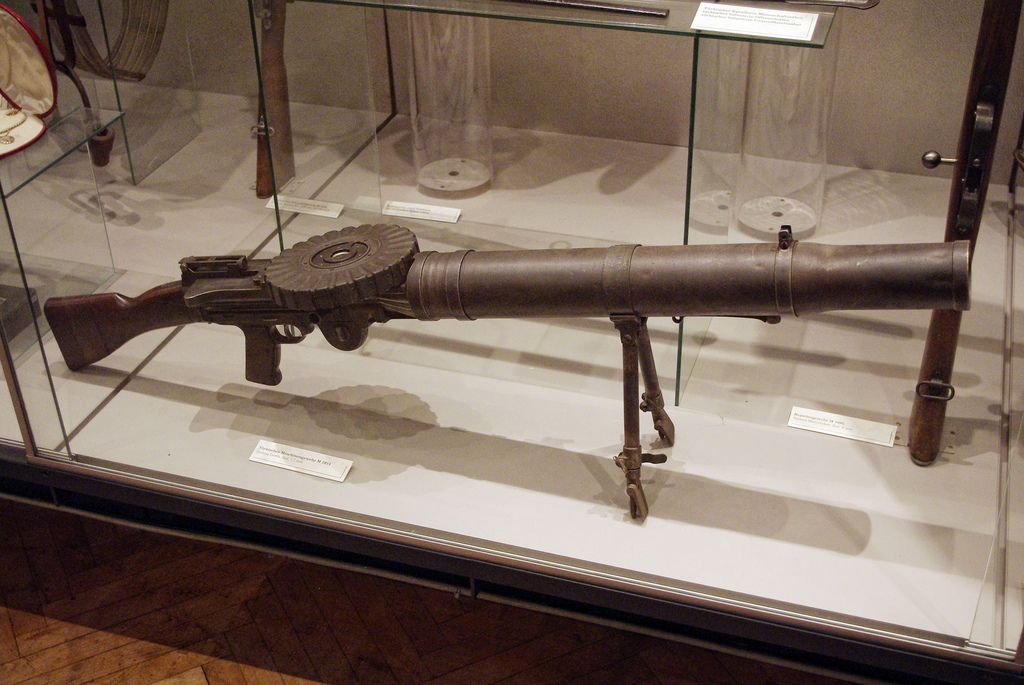 Türkisches Maschinengewehr M 1914, System Lewis, 7,7mm